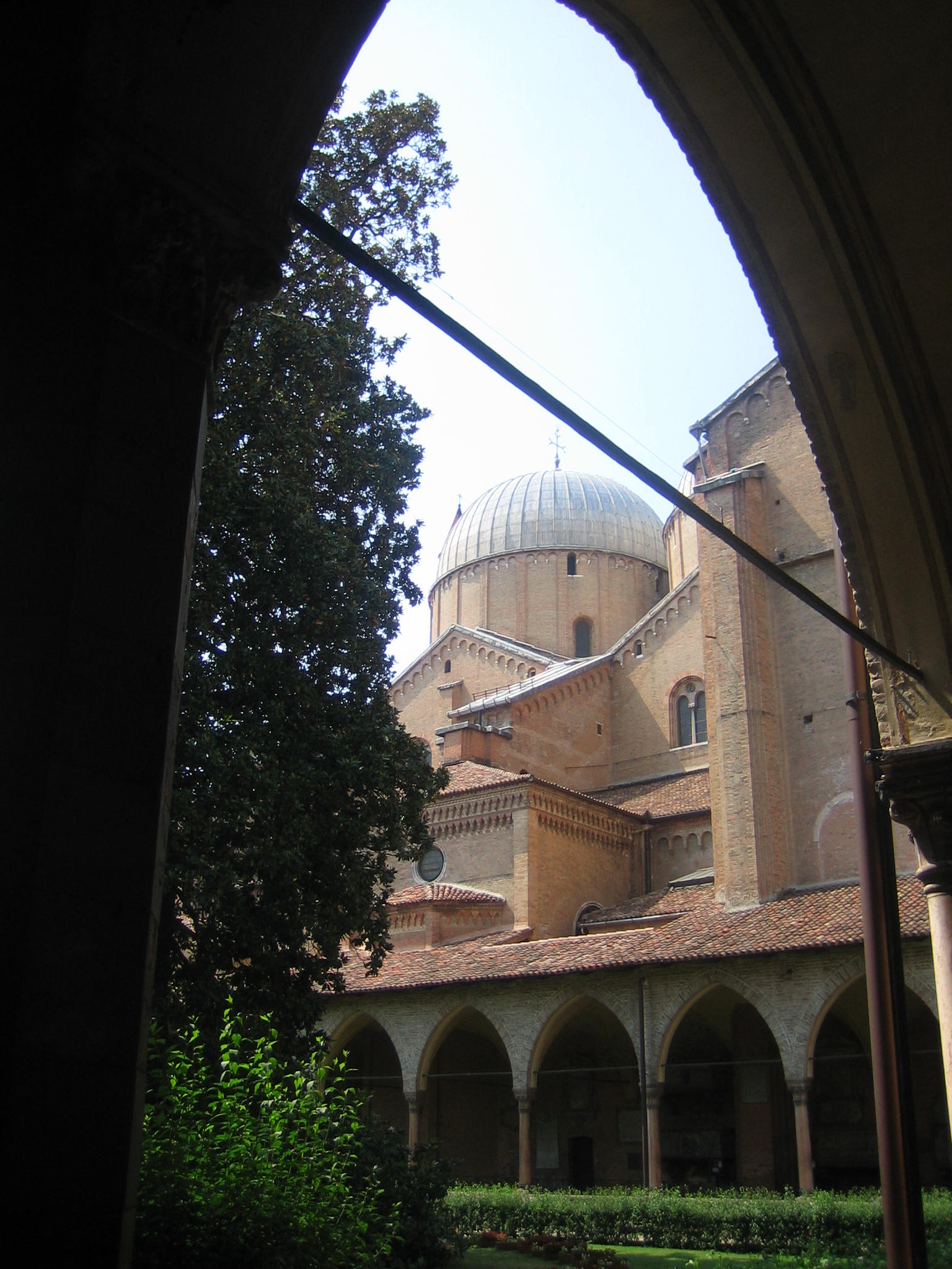 Kreuzgang an der Basilika des Hl.Antonius in Padua